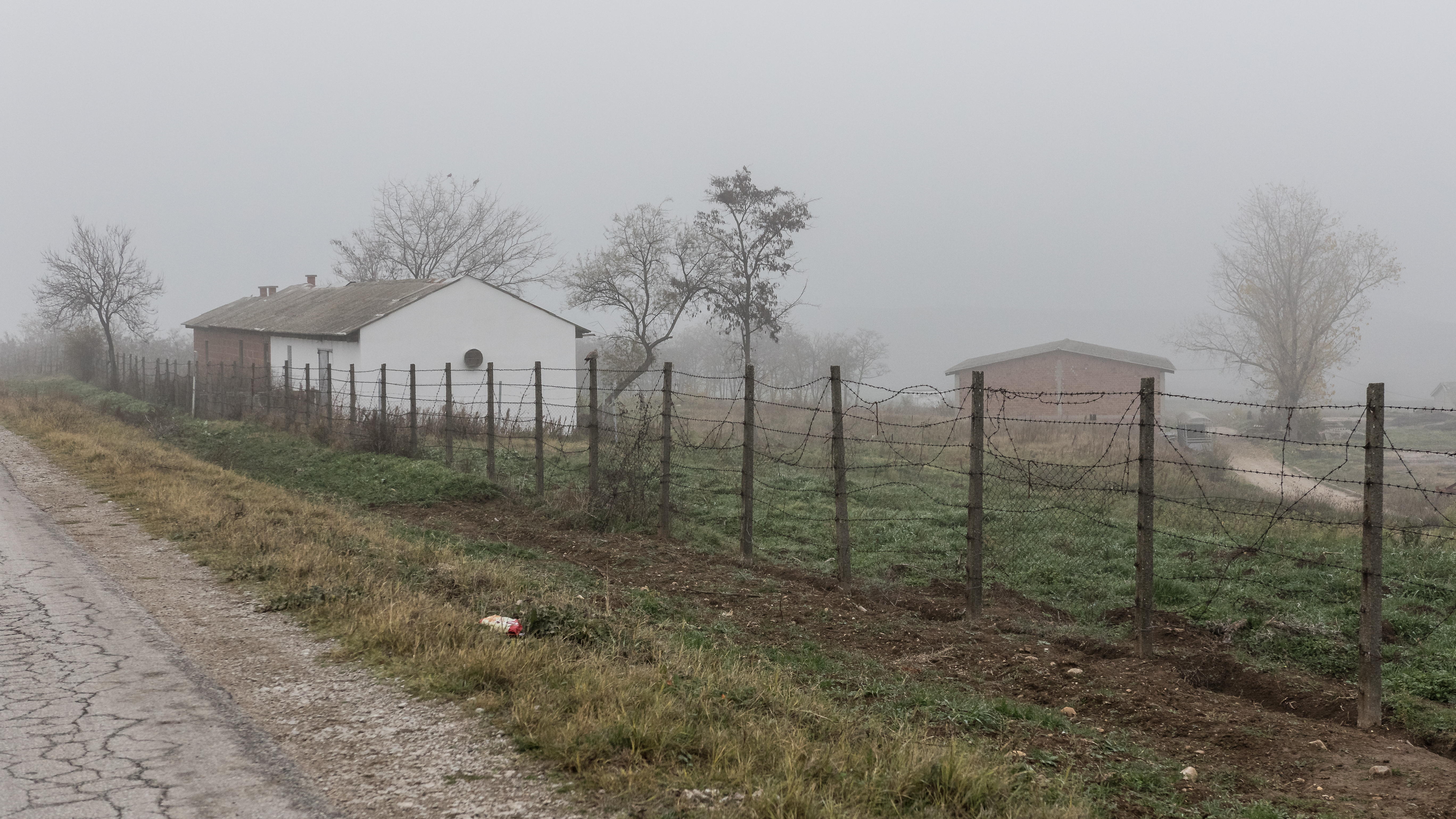 Фотографии од експедицијата во Градско